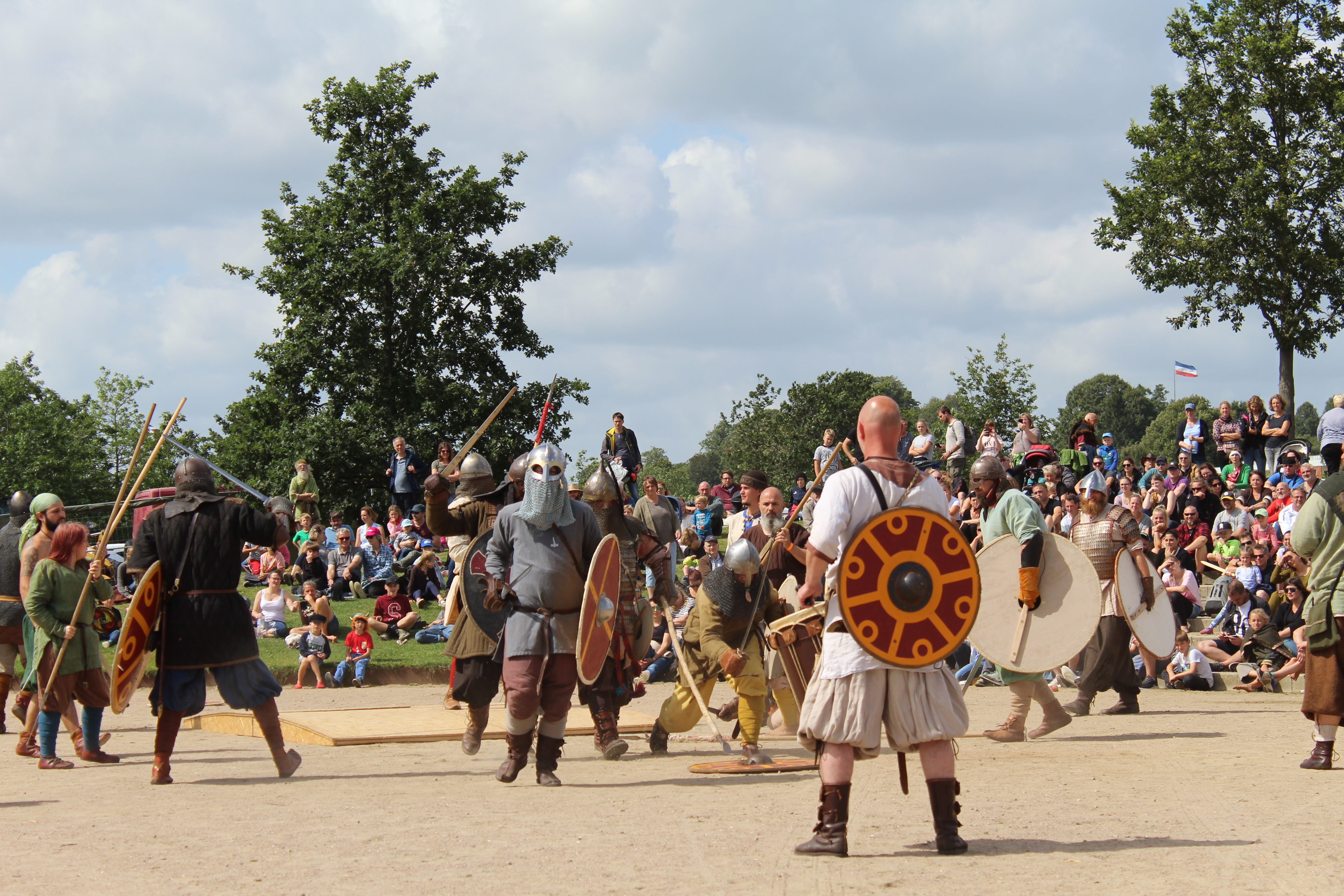 Wikingertage am 11. August 2019